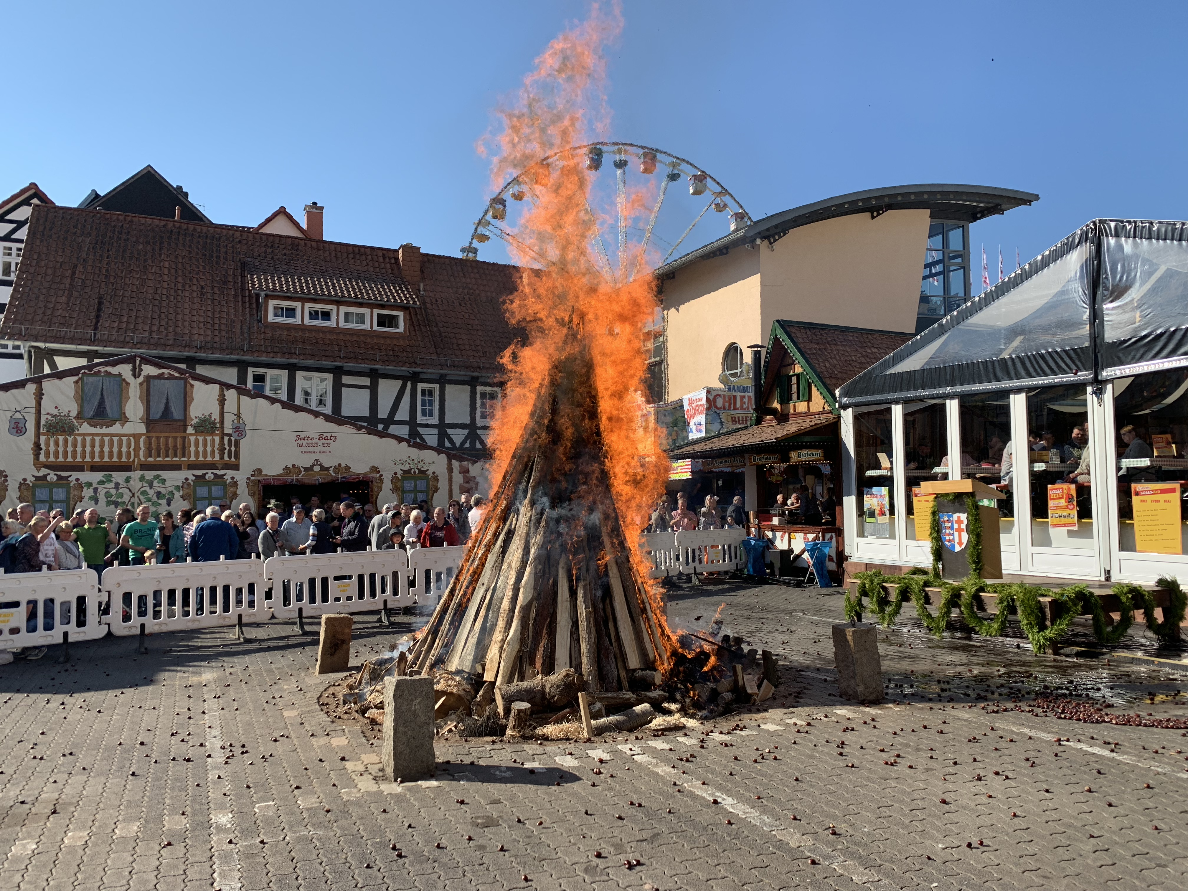 Entzünden des Lullusfeuers 2018